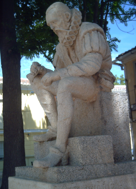 Escultura de Miguel de Cervantes, por Cayetano Hilario